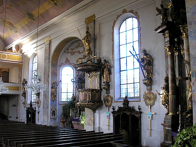 Pfarrkirche St. Michael (Mering, Landkreis Aichach-Friedberg, Bayerisch-Schwaben). Die Nordseite des Langhauses nach Westen. Eigene Aufnahme, März 2007 / Parish church St. Michael (Mering near Augsburg, Bavaria, Germany). Interior, the nave, looking north-west. Own photo, March 2007